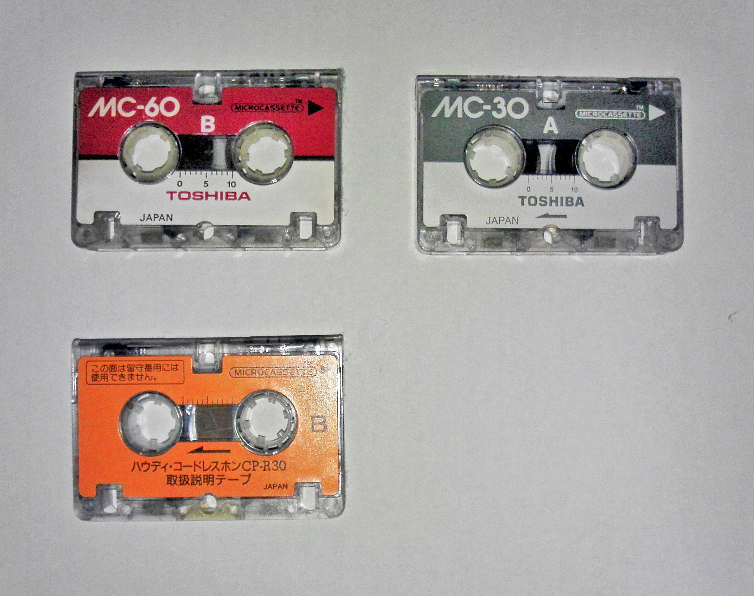 撮影者本人の所有物ですが、著作権は製造メーカーにあります。